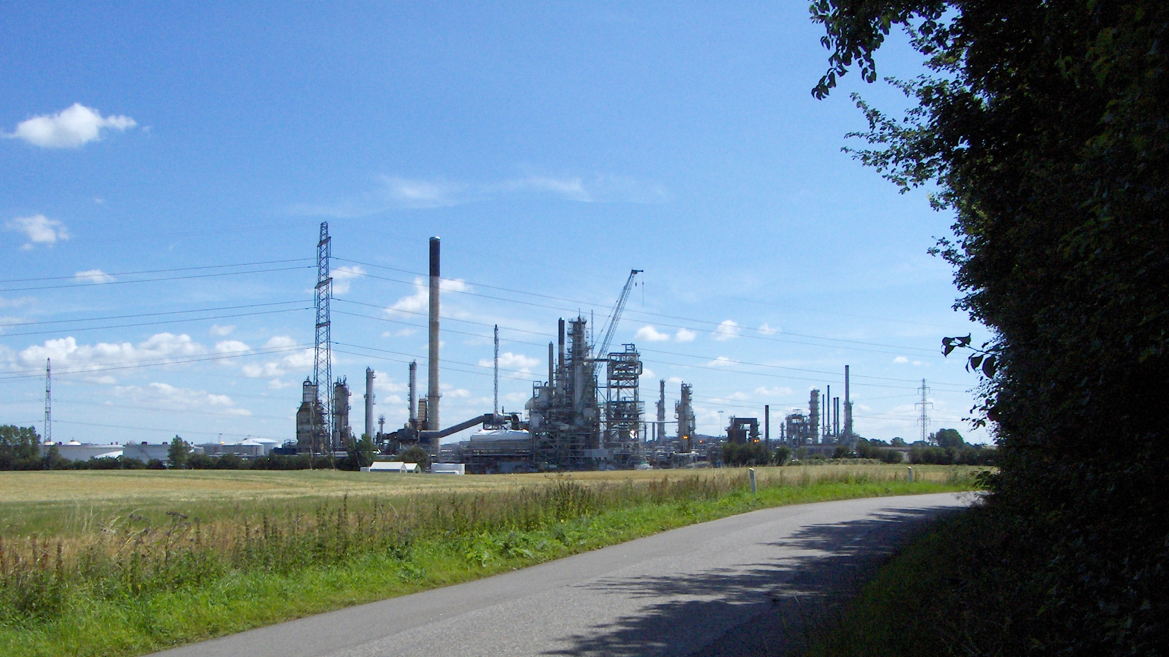 HydroStatoilraffinaderiet i Kalundborg